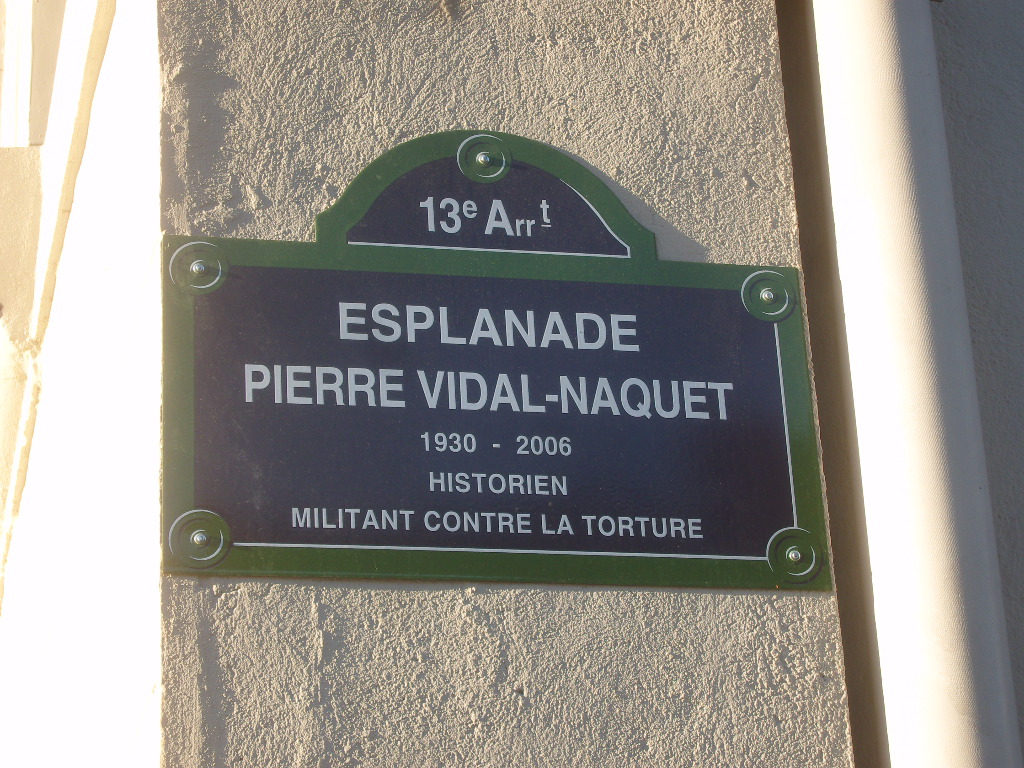 Paris 13e arrondissement - Esplanade Pierre-Vidal-Naquet - plaque de rue